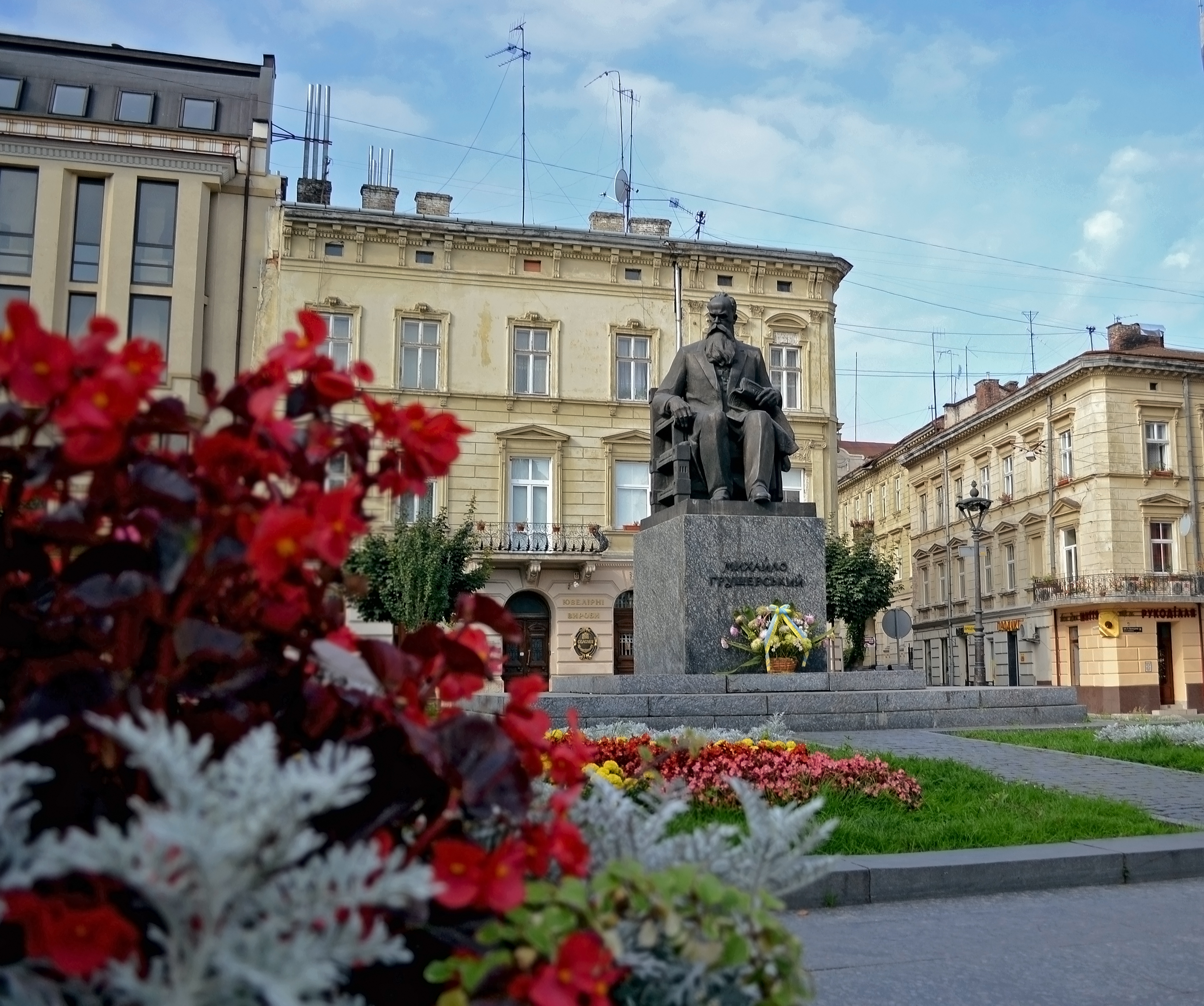 Пам'ятник Грушевському М., видатному історику, першому Президенту УНР у 1918 р., Львів, вул. Грушевського